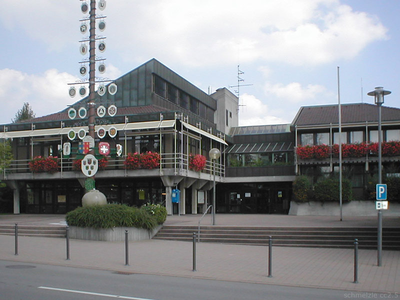 Rathaus von Gundelsheim (Württ.)